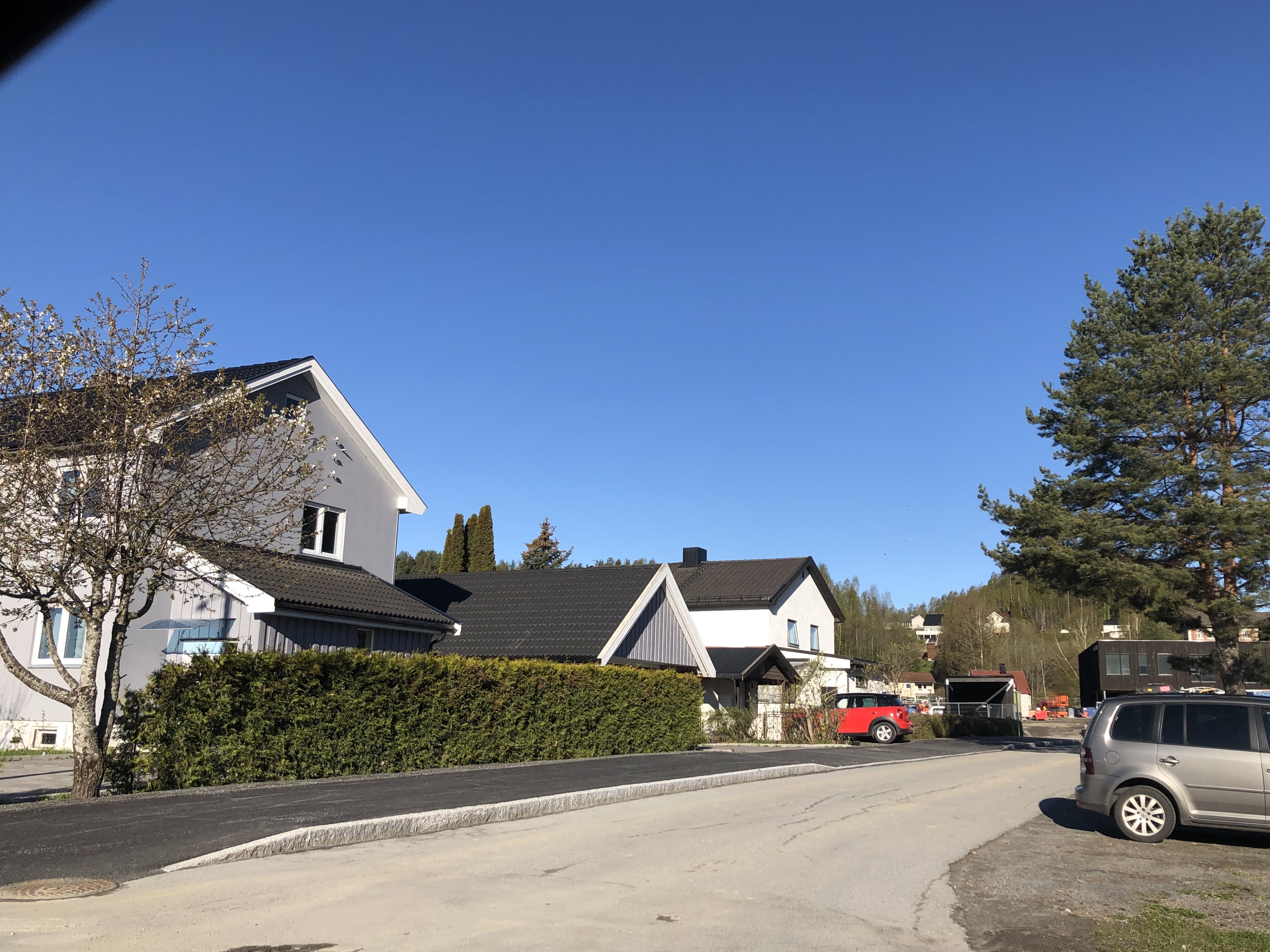 Klinikkveien, Hønefoss